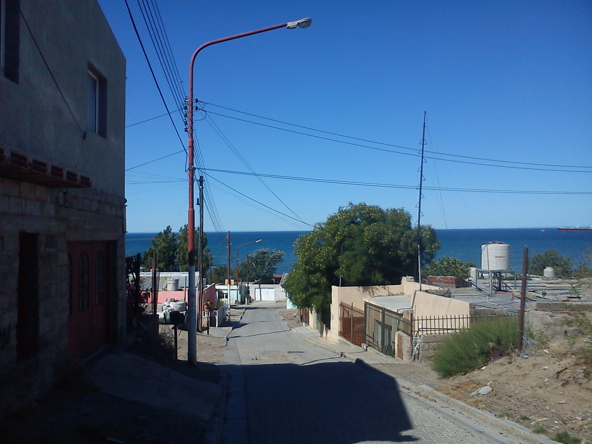 Pasaje del barrio